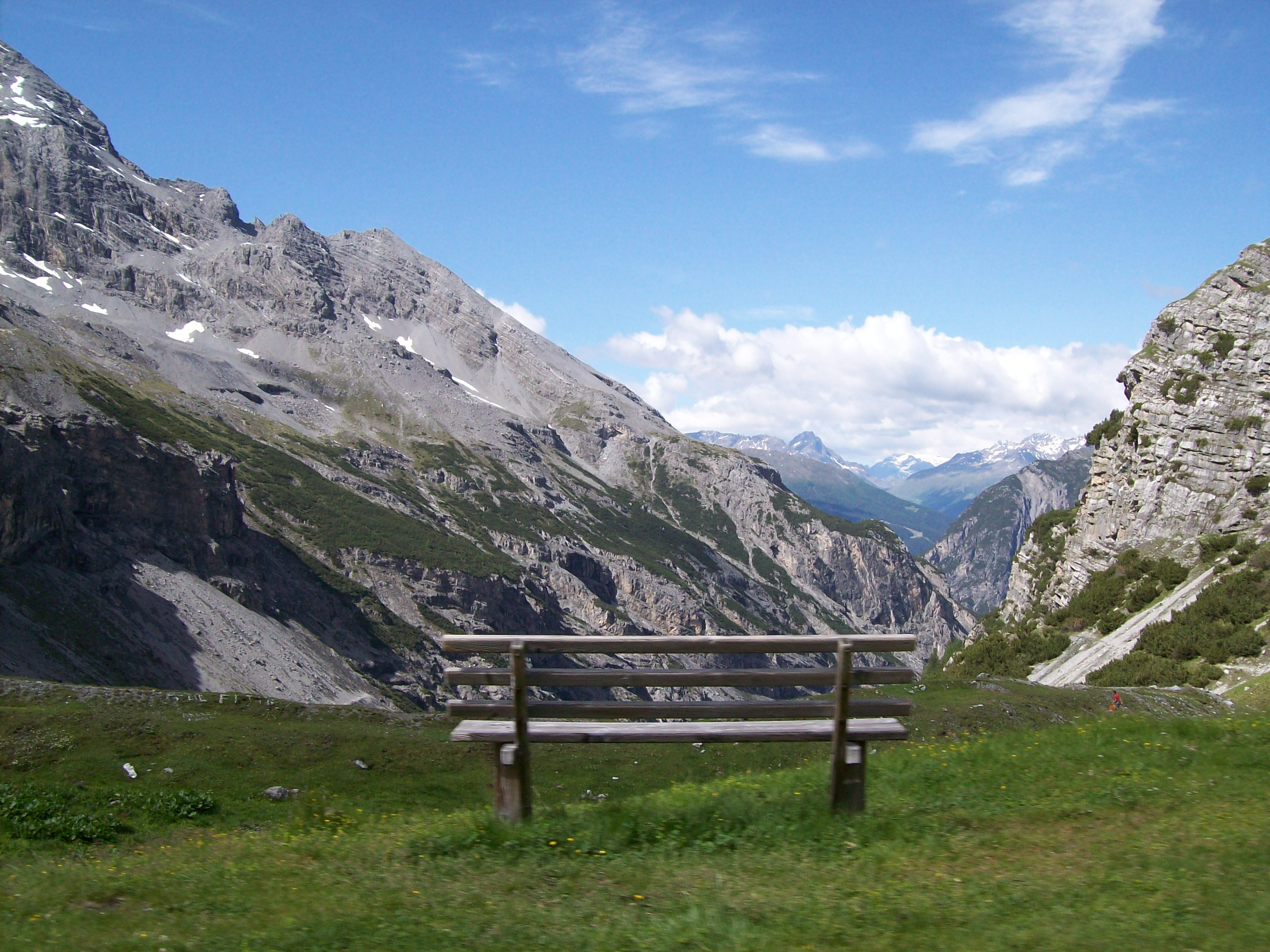 Veduta versante valtellinese del Passo dello Stelvio